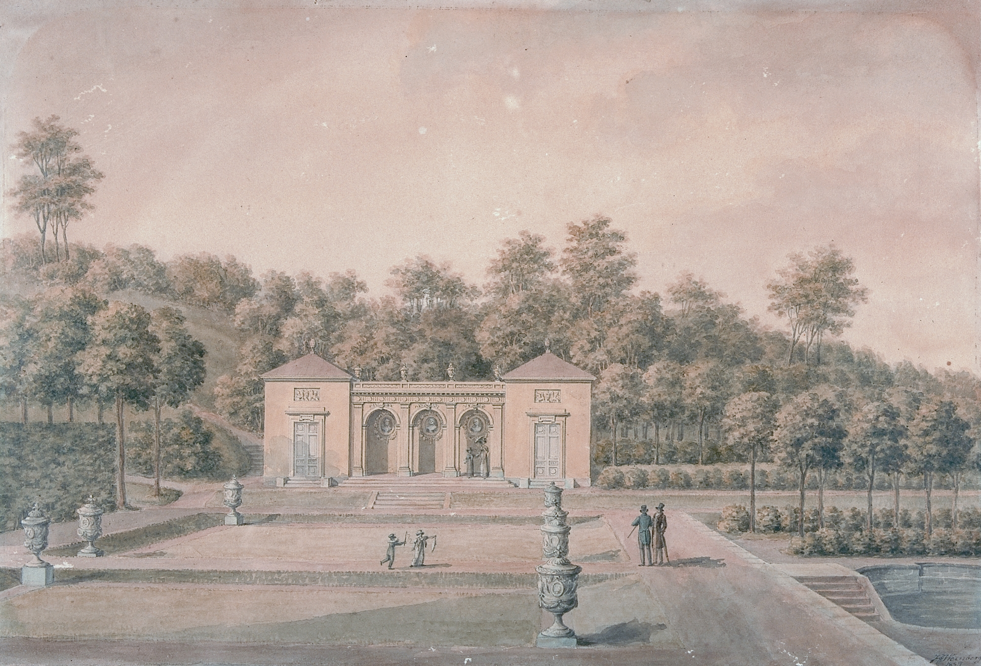 Akvarell föreställande Gunnebo slotts orangeri, Mölndal, Västergötland, av Justus Friedrich Weinberg (1770-1832), Signerad med årtal 1827.